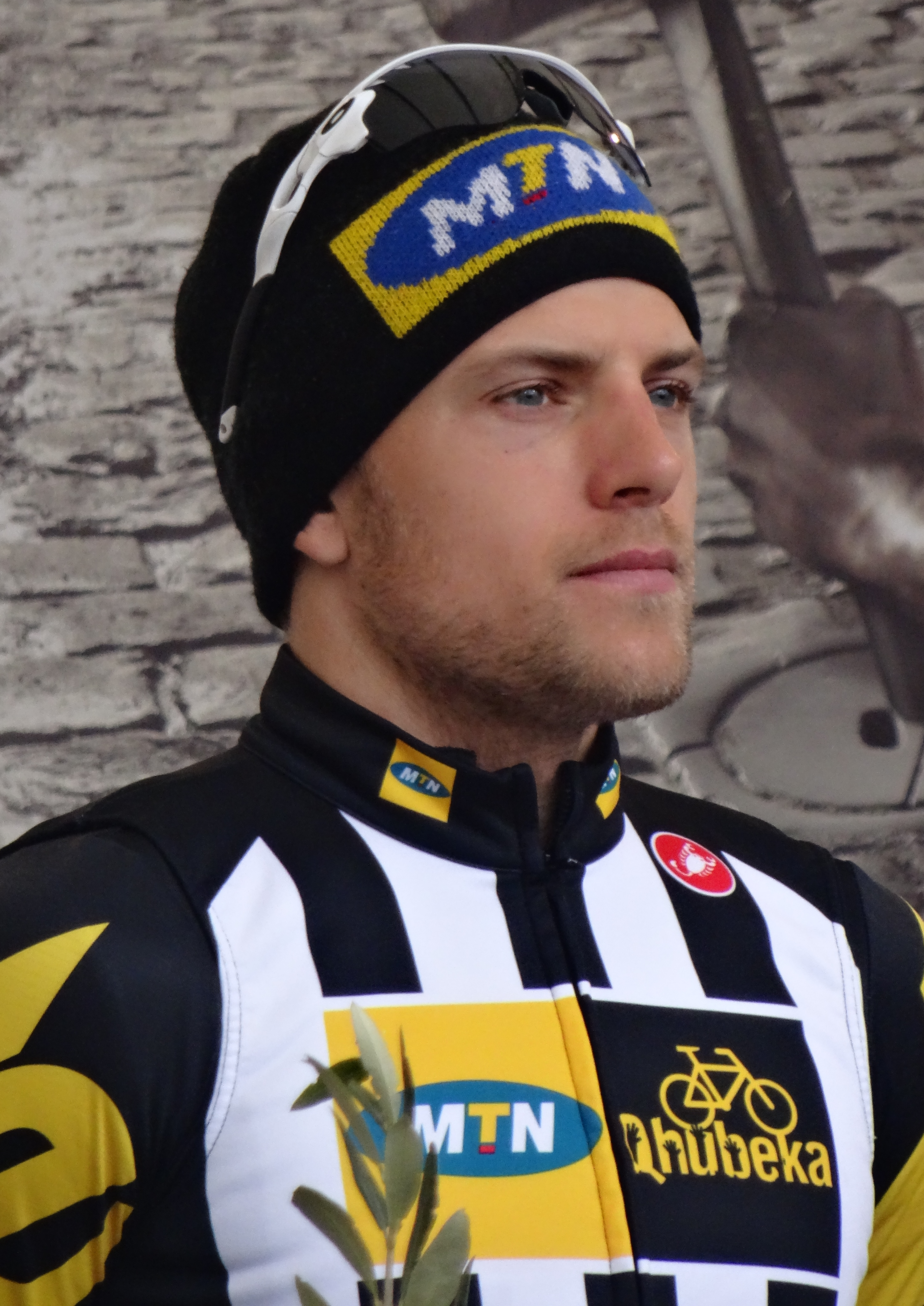 Reportage réalisé le dimanche 1er mars à l'occasion du départ et de l'arrivée de Kuurne-Bruxelles-Kuurne 2015 à Kuurne, Belgique.